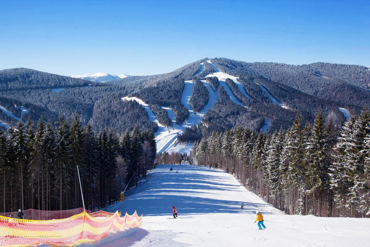 Вид на трассы курорта с верхней станции подъемика